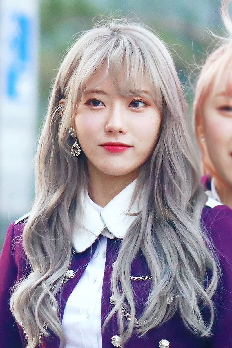 180317 우주소녀 미니팬미팅 직찍